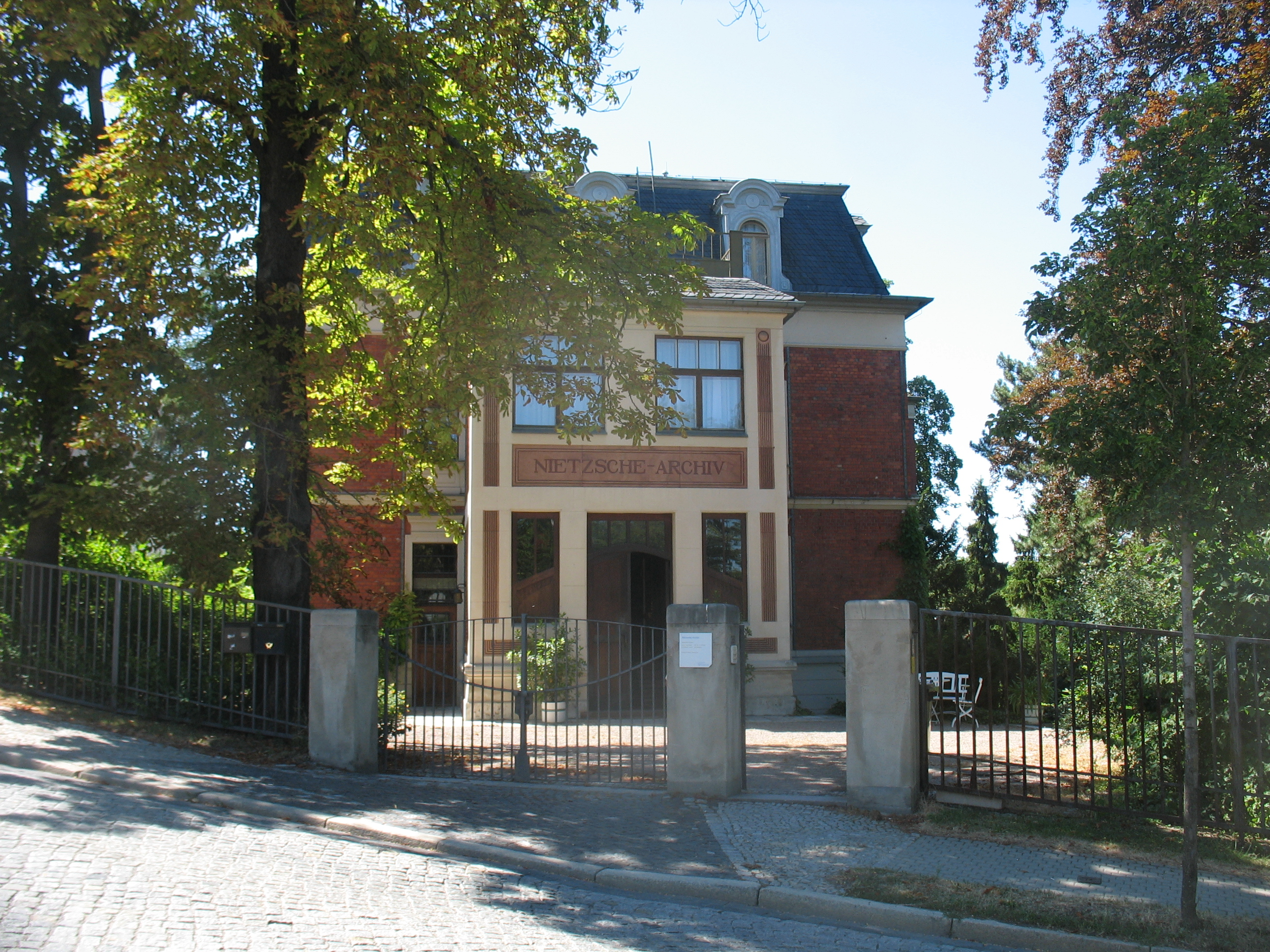 The Nietzsche Archives in Weimar, Germany.